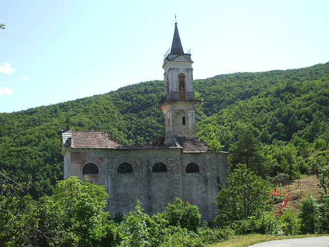 Chiesa di San Ruffino di Canarie (Mongiardino Ligure) in val Gordenella (AL).